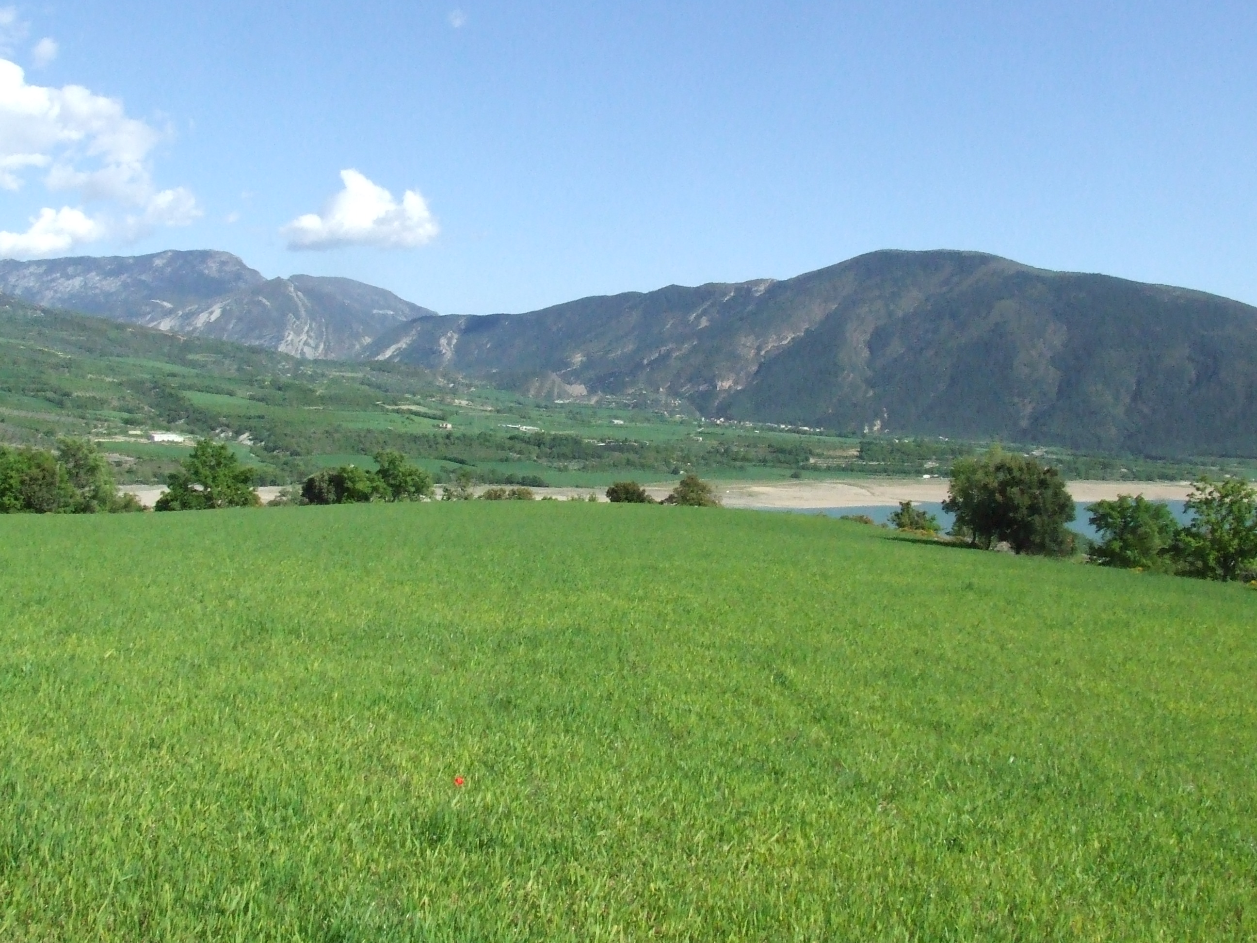 Antic terme d'Aramunt (Conca de Dalt, Pallars Jussà)